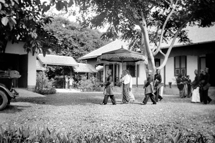 Negatief. Na een officiële ontvangst in het huis van de assistent-resident te Mamuju, Celebes, vertrekt de voornaamste Maradia, de zelfbestuurder van Balanipa, onder een pajong en wordt gevolgd door de Hadat, de zelfbestuursraad